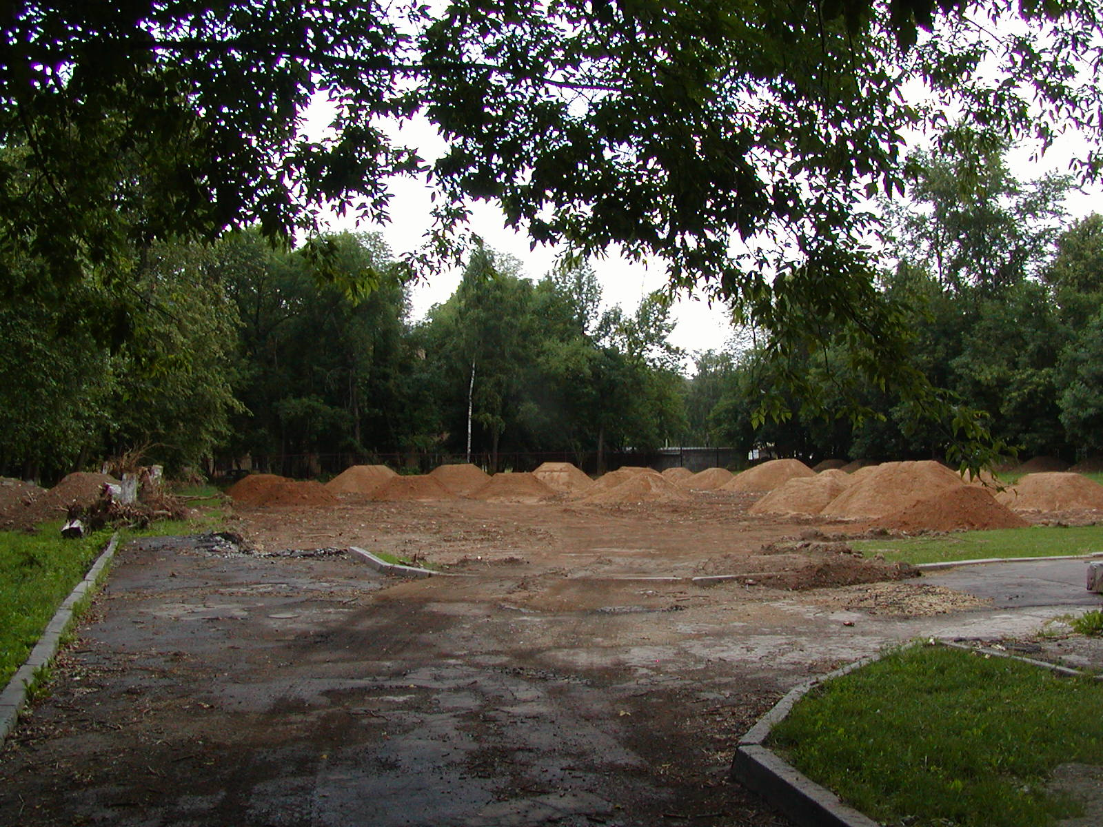 Строительство многофункциональной спортивной площадки Гимназии города Обнинска летом 2011 года.